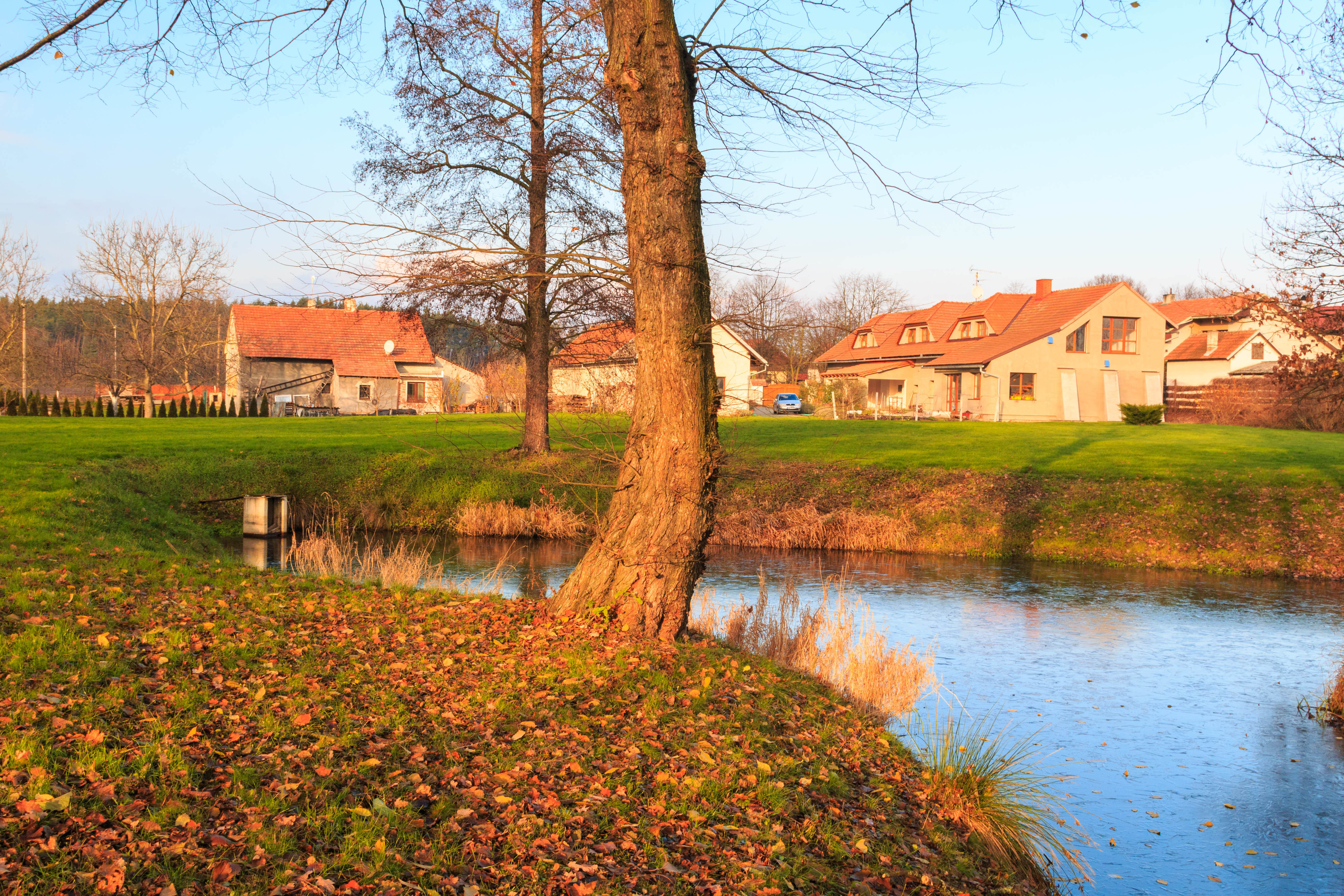 Tůň u Neratova Project: Vodstvo.